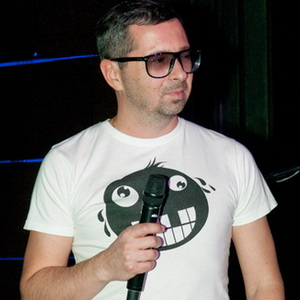 Алексей Рыжов на презентации клипа «Нано-Техно» в ресторане «Ноа» 20 октября 2011 года